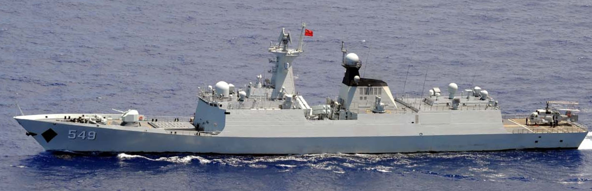 ９月８日（日）午後１１時頃から９日（月）午前２時頃にかけて、海上自衛隊第１１護衛隊「やまゆき」（横須賀）及び第５航空群所属「Ｐ－３Ｃ」（那覇）が、宮古島の北東約１００ｋｍの海域を太平洋から東シナ海に向けて北西進する中国海軍ジャンカイⅡ級フリ ゲート２隻を確認した。